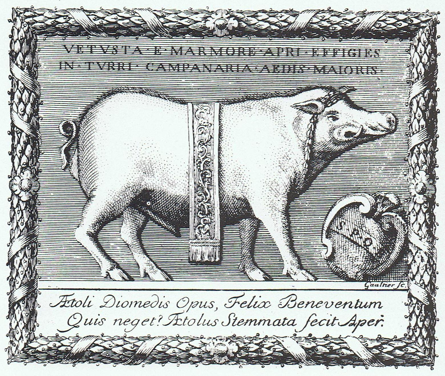 Incisione di P.J. Gaultier su disegno di G.B. Natali raffigurante il cinghiale stolato, simbolo della città di Benevento. L'incisione è ispirata a un bassorilievo romano incastrato nella parete est del Duomo di Benevento.